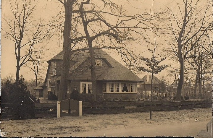 De foto is voor de oorlog gemaakt omdat hier de originele ramen van de erker nog zichtbaar zijn. In de oorlog is het voorgelegen spoor gebombardeerd door de geallieerden waardoor de gevel ramen zijn beschadigd en bij reparatie aangepast.